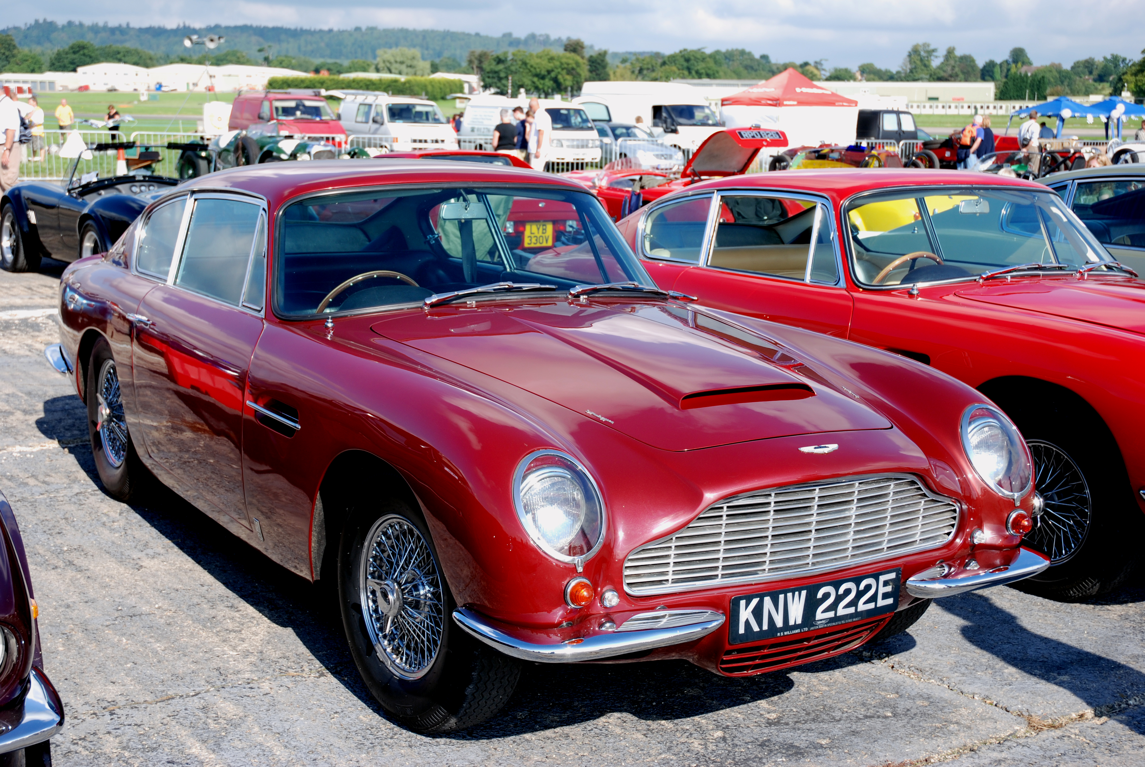 @ Dunsfold Wheels and Wings 2007